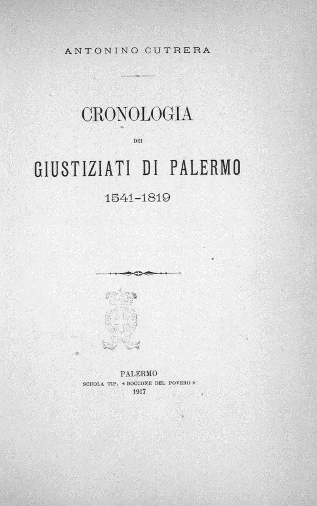 Frontespizio